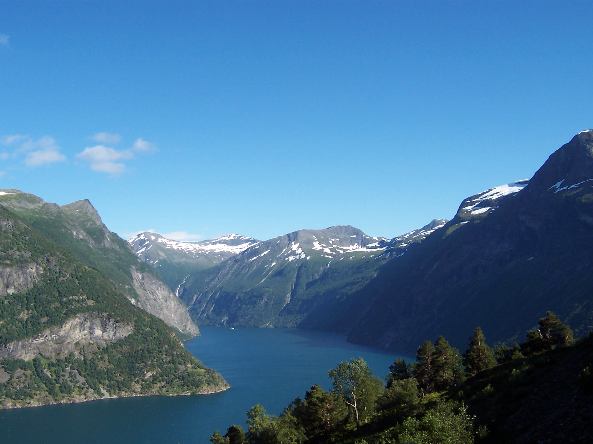 Fjord in Sunnmøre, Norway; Geirangerfjord seen across Sunnylvsfjord from somewhere near Ljøen/Road 60 Stranda-Hellesylt